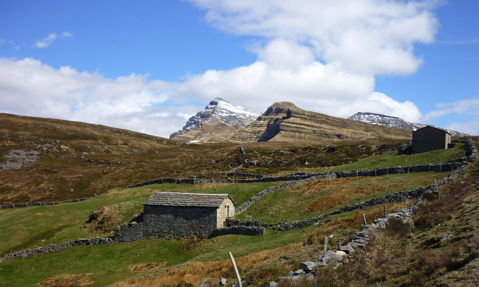 Invernales en el puerto de las Estacas de Trueba, Cantabria. Castros de Valnera.